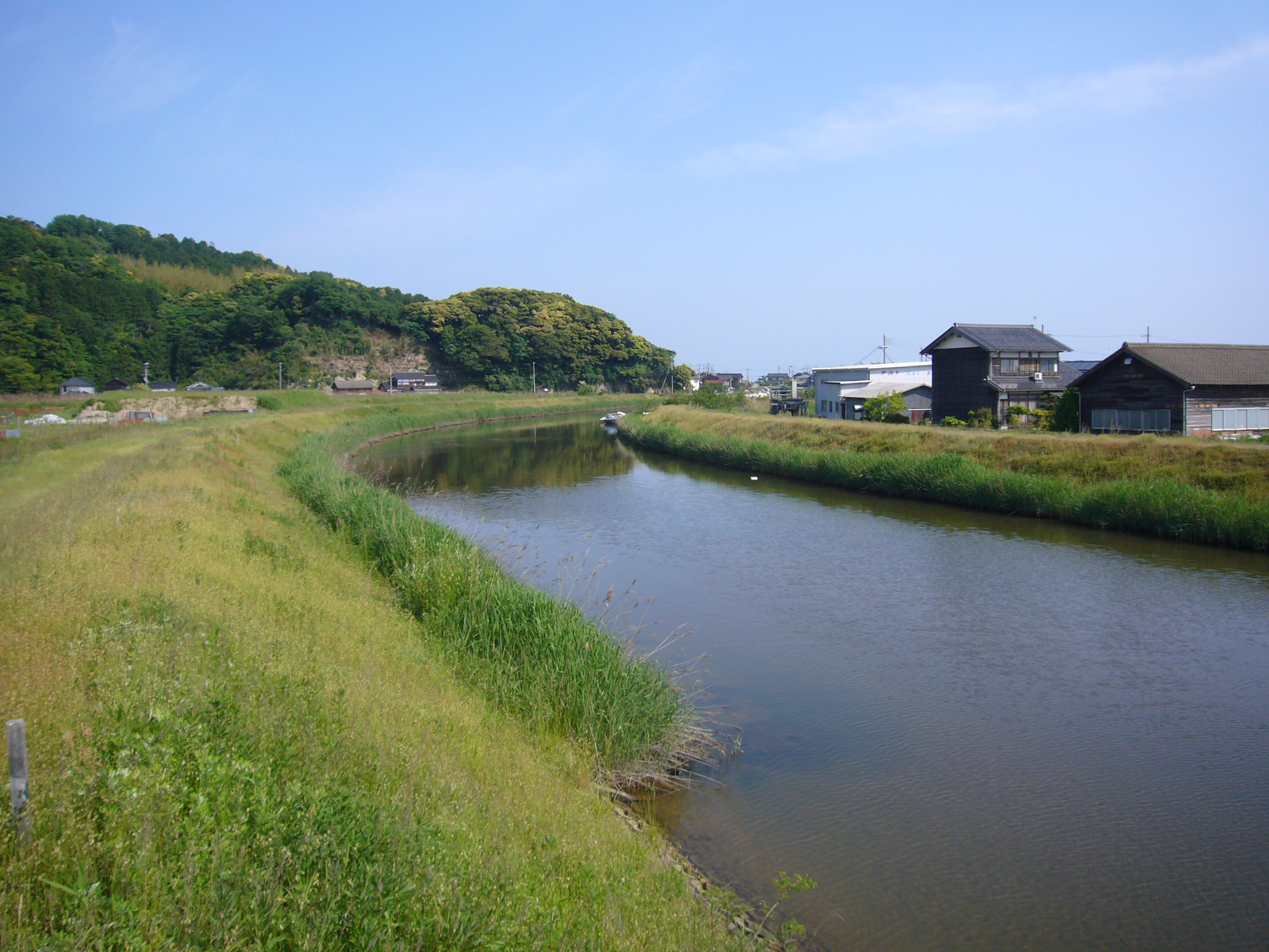 福田川河口付近（京丹後市網野町浅茂川） Panasonic Lumix DMC-FX01